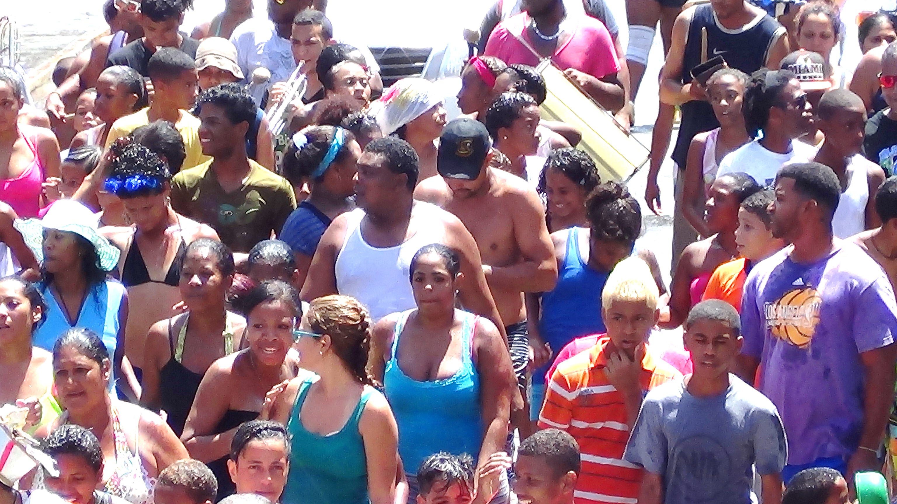 Los Tacarigueños, gente alegre.